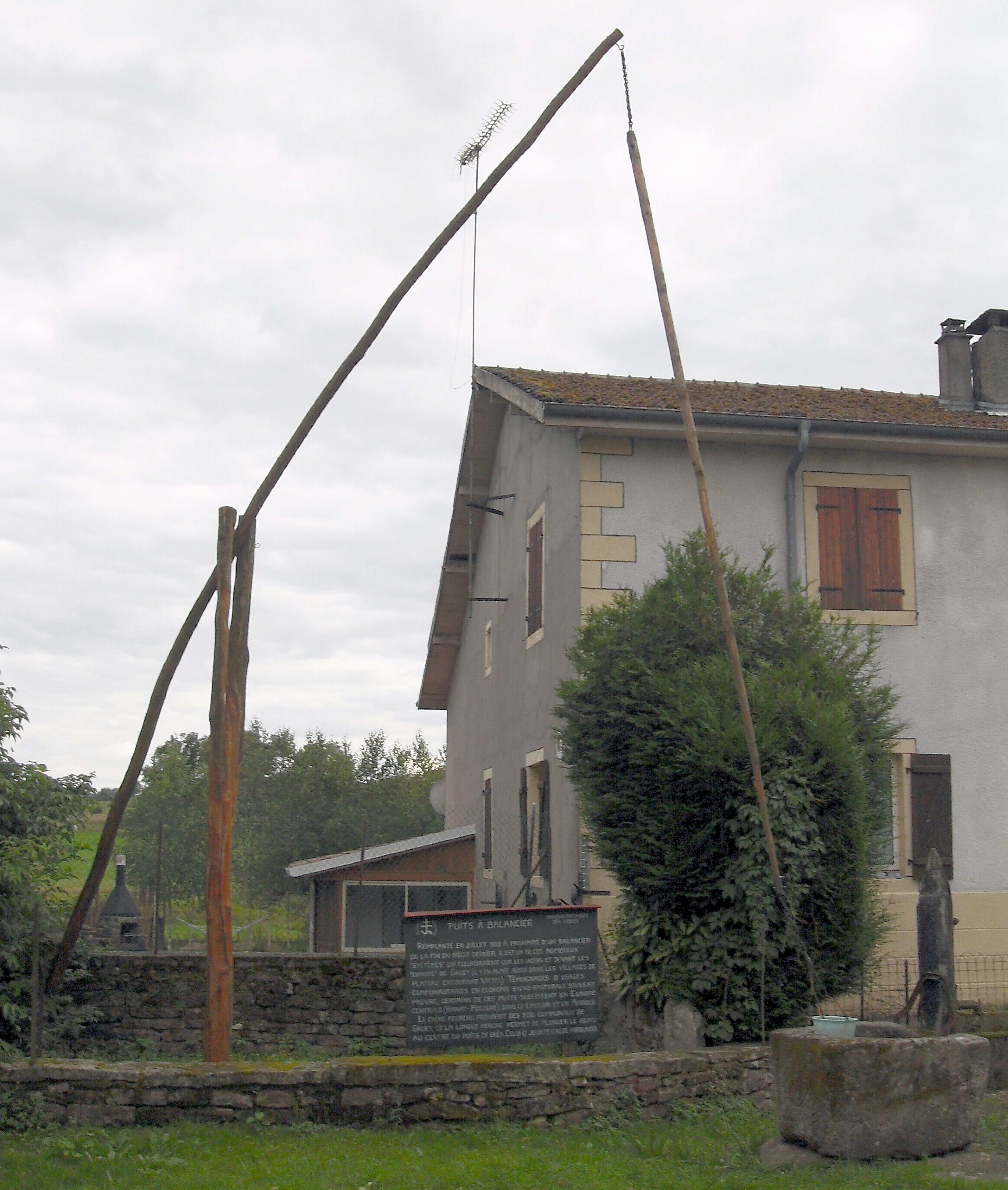 Puits à balancier de Gruey-lès-Surance